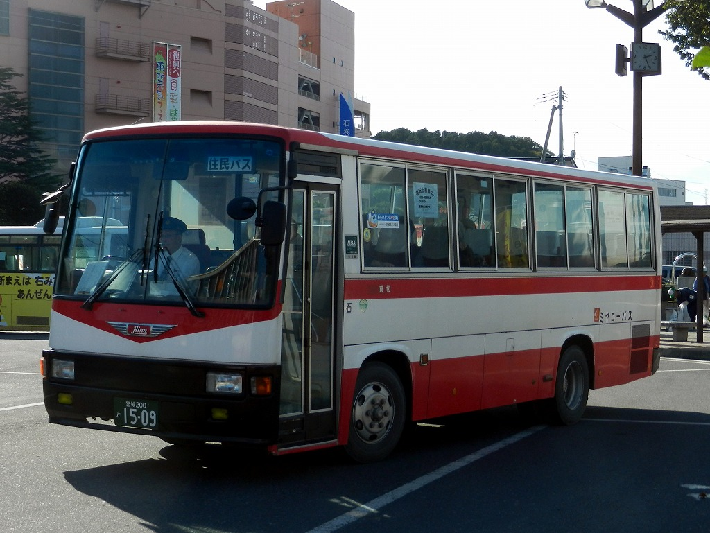 ミヤコーバス 日野・レインボー（観光型マスク）